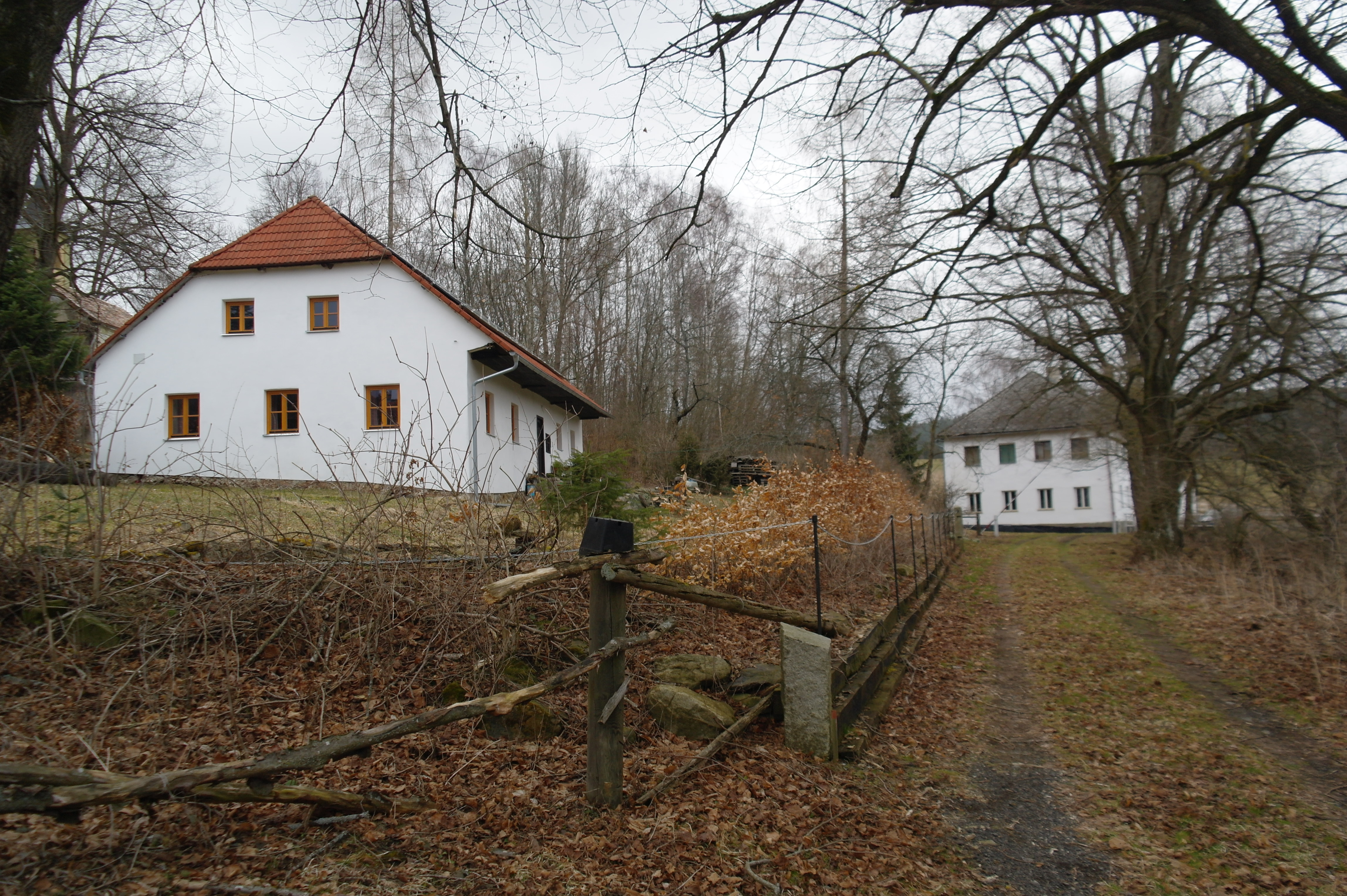 Krejčovice, domy čp. 52 a 46